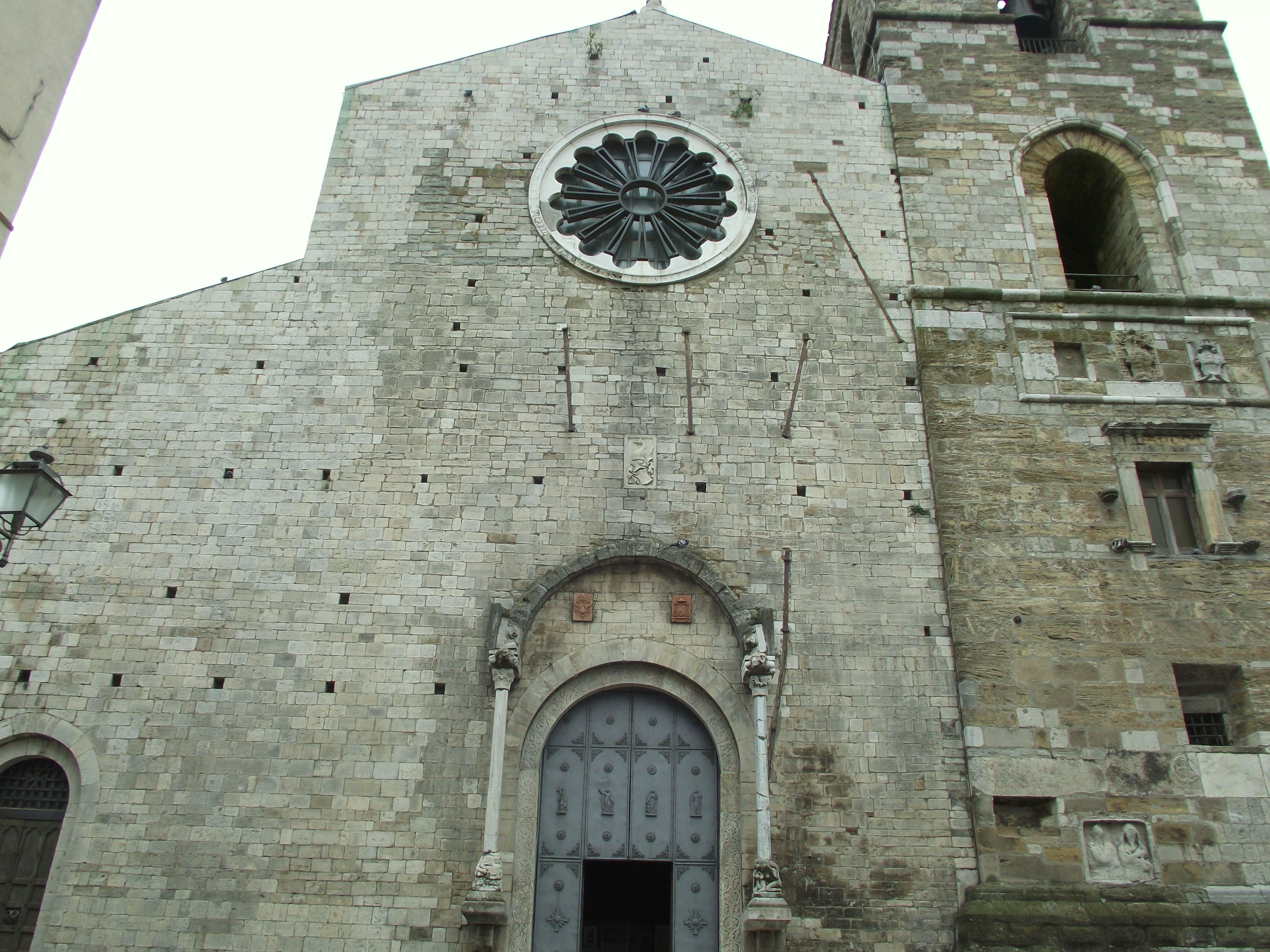 la facciata della cattedrale